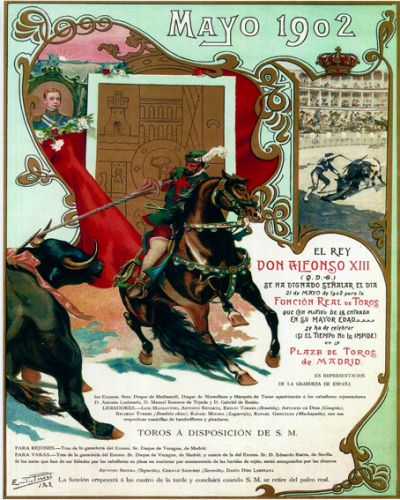 Cartel taurino de 1902 en el que puede leerse la siguiente leyenda: "El Rey Don Alfonso XIII (q.D.g.) se ha dignado señalar el día 21 de mayo de 1902 para la Función Real de Toros que con motivo de la entrada en su mayor edad se ha de celebrar en la Plaza de Toros de Madrid. En representación de la Grandeza de España los Excmos. Sres. Duque de Medinaceli, Duque de Montellano y Marqués de Tovar apadrinarán a los caballeros rejoneadores D. Antonio Luzimariz, D. Manuel Romero de Tejada y D. Gabriel de Benito.. Lidiadores: Luis Mazzantini, Antonio Reverte, Emilio Torres (Bombita), Antonio de Dios (Conejito), Ricardo Torres (Bombita chico), Rafael Molina (Lagartijo) y Rafael González (Machaquito). Toros a disposición de S.M: para rejones, tres de la ganadería del Excmo. Sr. Duque de Veragua; para varas, tres de la ganadería del Excmo. Sr. Duque de Veragua y cuatro de la del Excmo. Sr. D. Eduardo Ibarra".